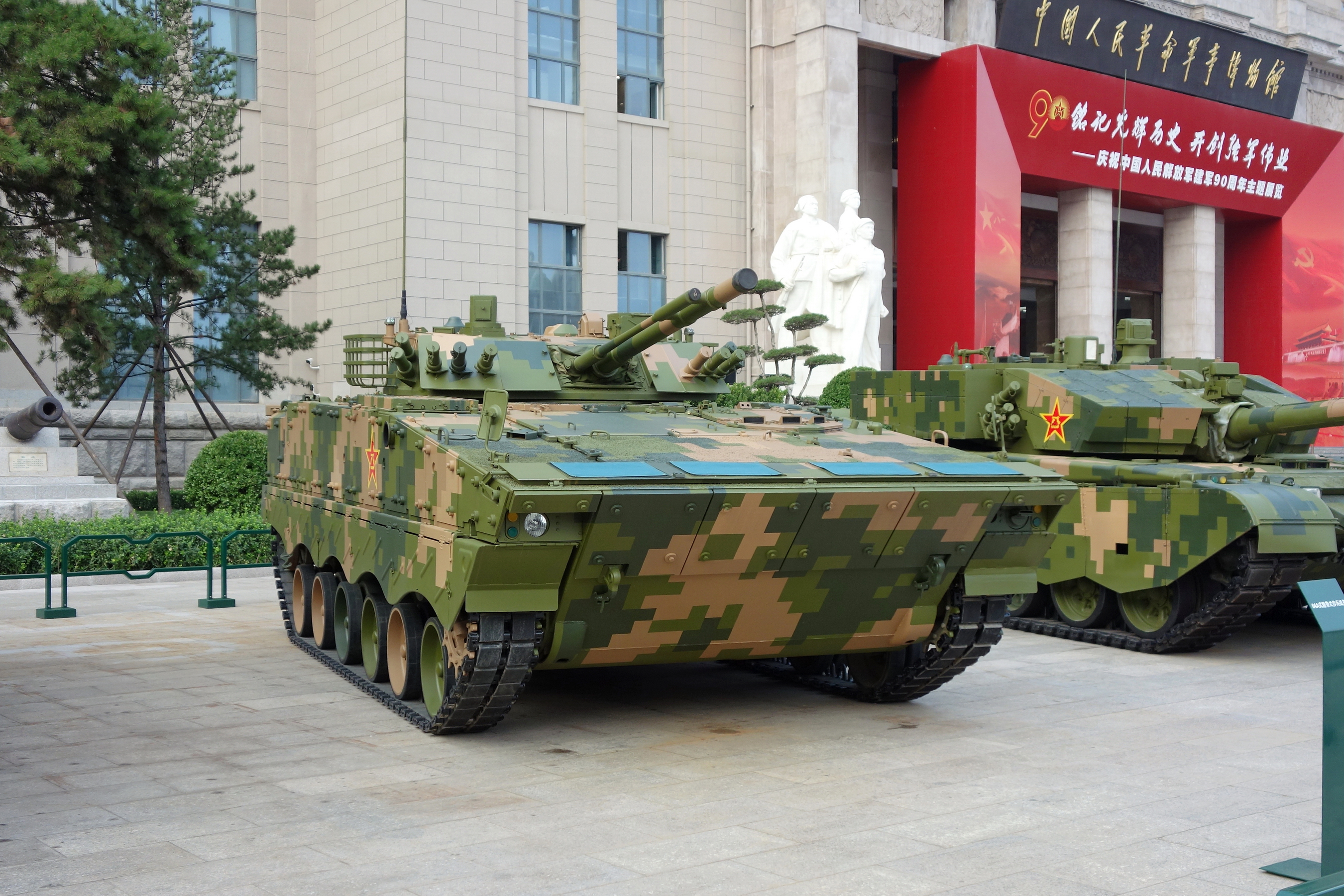 中国人民革命军事博物馆纪念中国人民解放军建军90周年主题展览展出的ZBD-04A步兵战车。